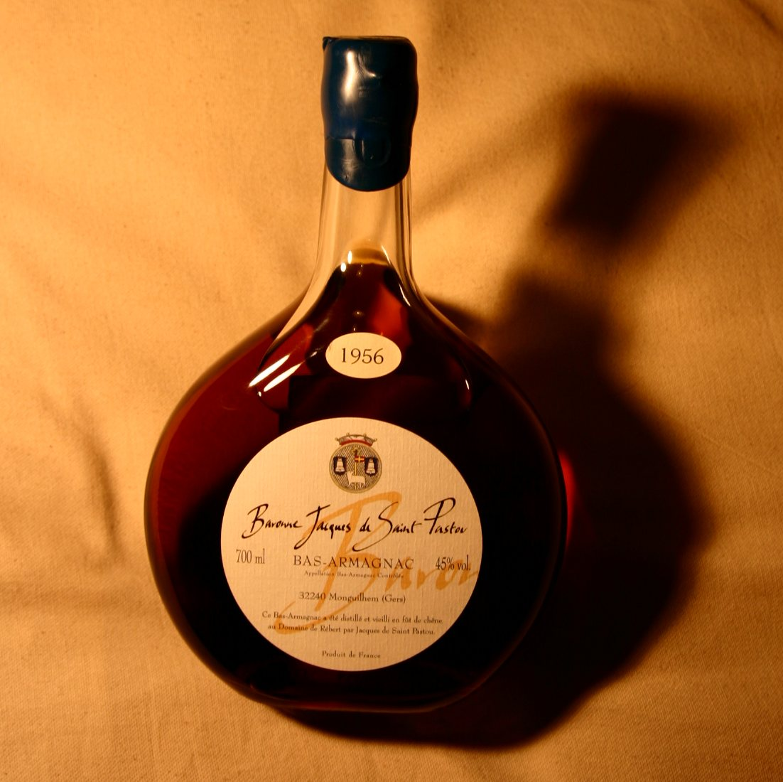 Armagnac millésimé 1956